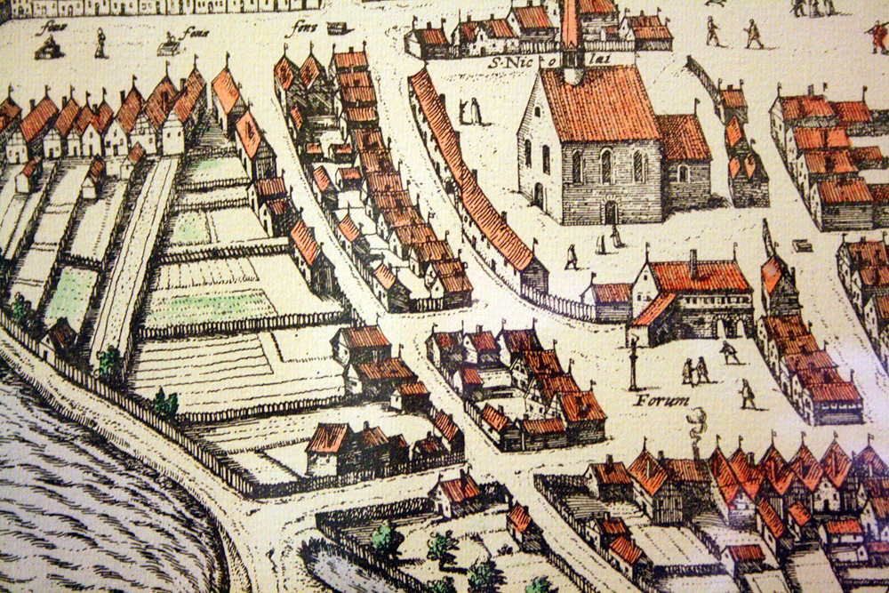 Kupferstich von Braun/Hogenberg, Eckernförde Ausschnitt mit St. Nicolaistraße, Kirche und Rathausplatz, um 1600